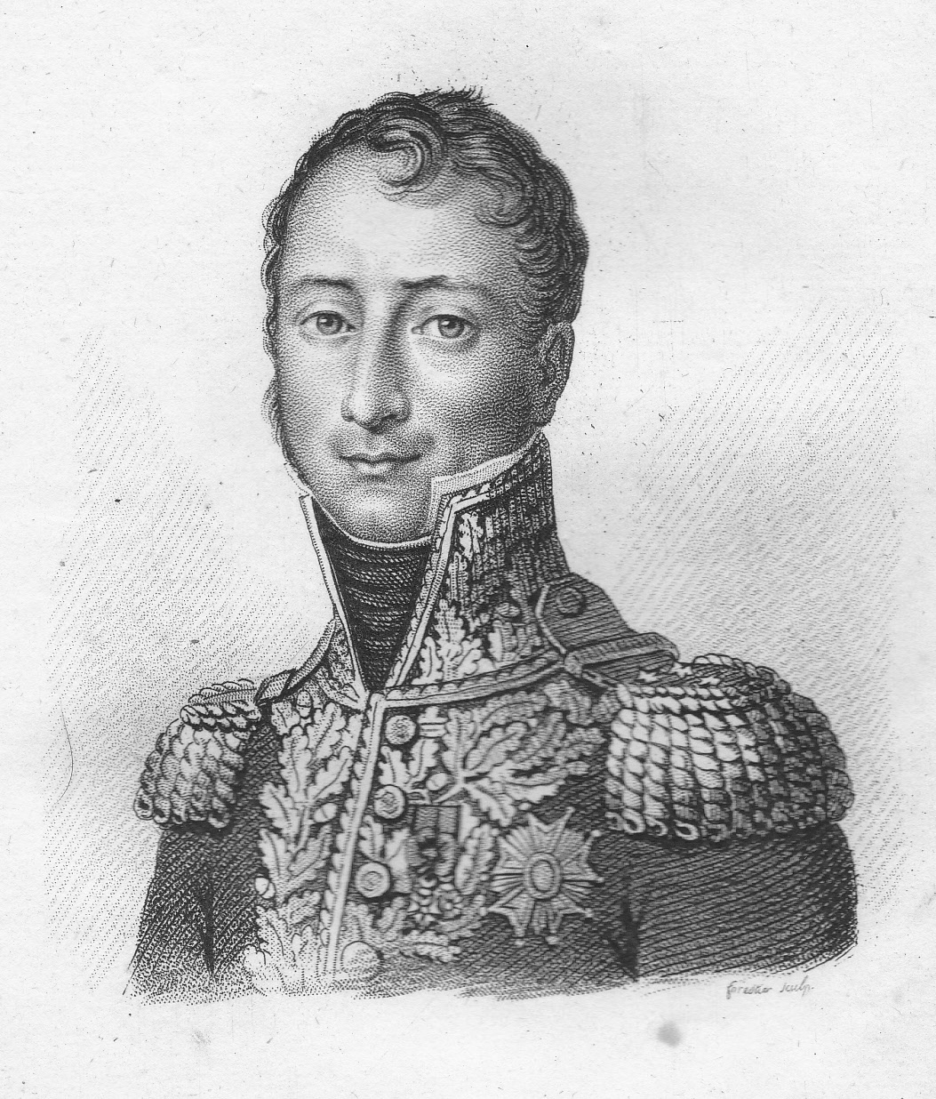 Auguste Jean Gabriel de Caulaincourt (1777-1812), général de division et comte de l'Empire. Frère du grand écuyer, il est tué en menant une charge de cavalerie à la bataille de la Moskova, le 7 septembre 1812.